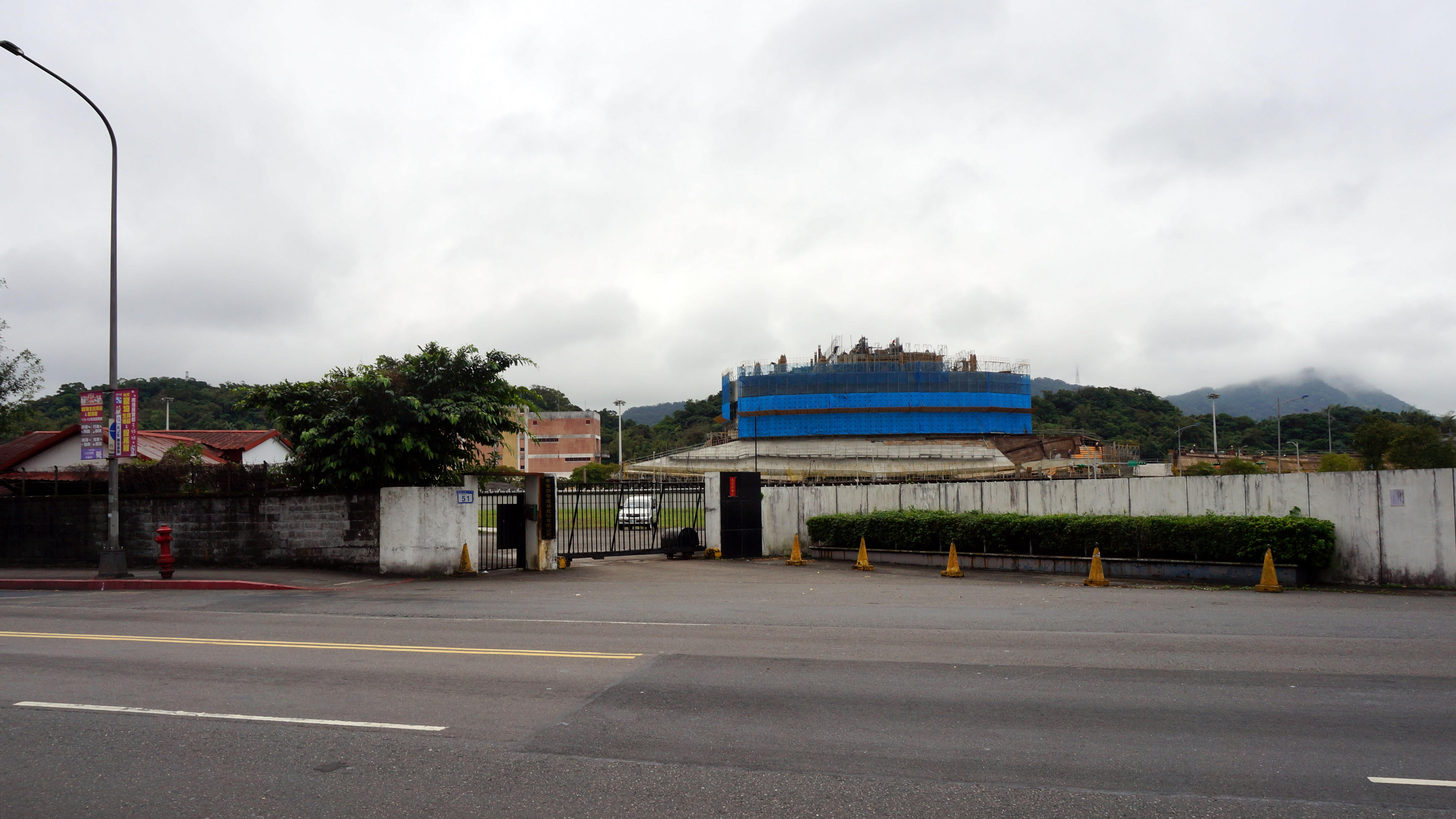 南港輪胎南港廠，位於臺北市南港區南港路二段51號，已被拆除完畢。